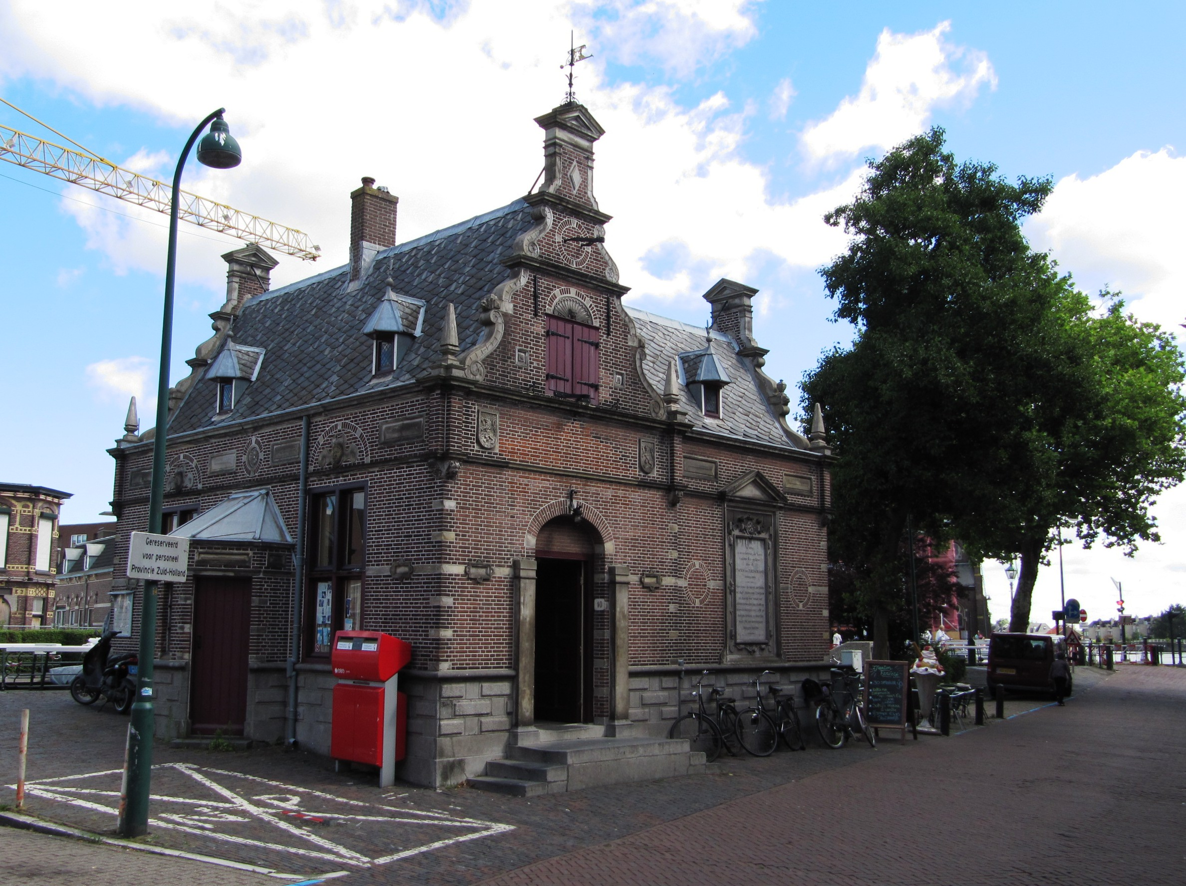 Leidschendam - Sluisplein 10, sluiswachterskantoor dat tussen 1886 en 1888 in neo-renaissancestijl is opgetrokken naar een ontwerp van de Utrechtse architect F.J. Nieuwenhuis; rijksmonument